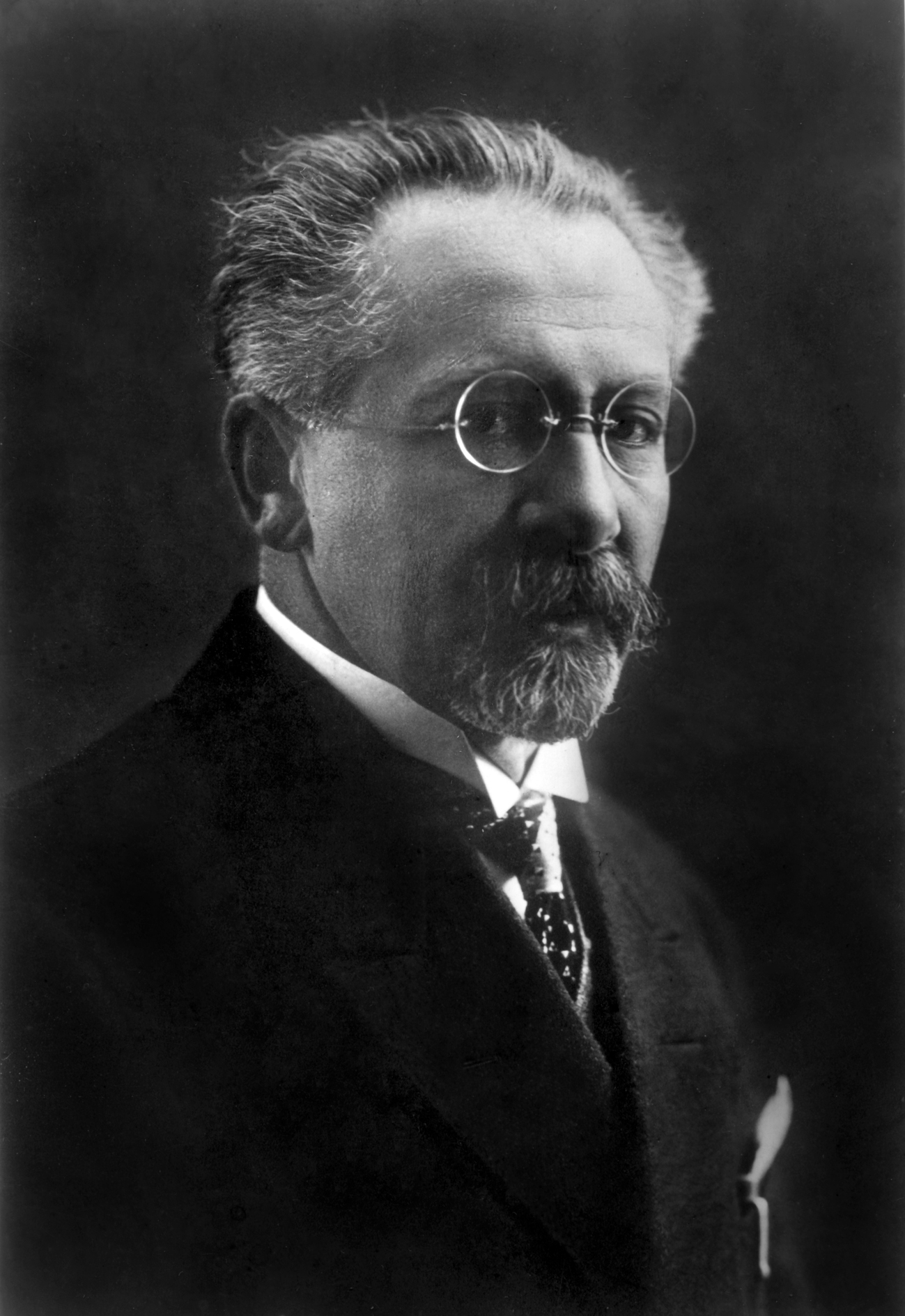 Профессор Киевского института усовершенствования врачей Евгений Львович Скловский (педиатрия)